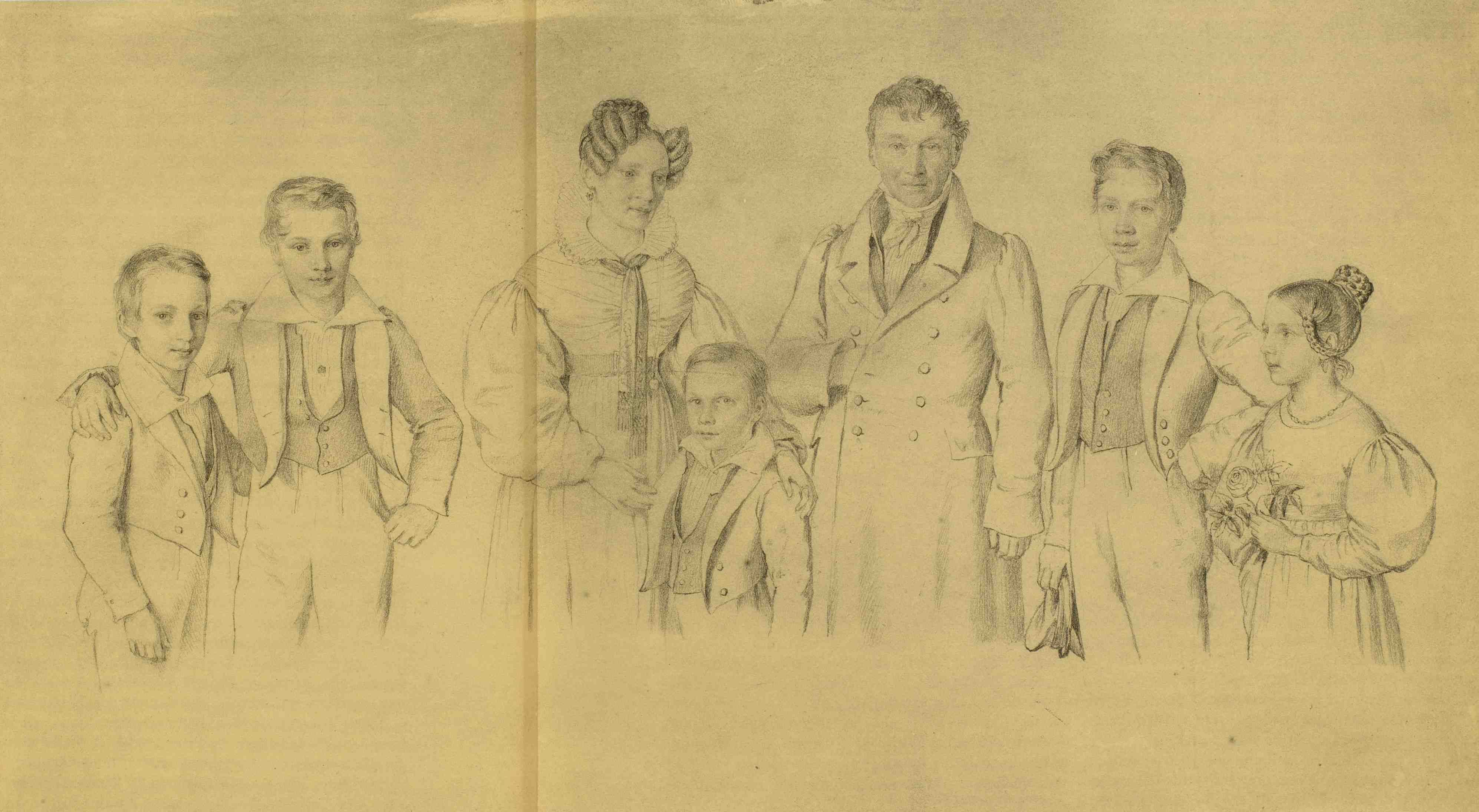 Familie von Johann Heinrich Staub (1781–1854), Bleistiftzeichnung von Melchior Paul von Deschwanden. Von links nach rechts: Arnold Staub, Gustav Staub, Anna Magdalene Staub geb. Steinmann, Emil Staub, Johann Heinrich Staub, Theodor Staub und Emilie Staub.